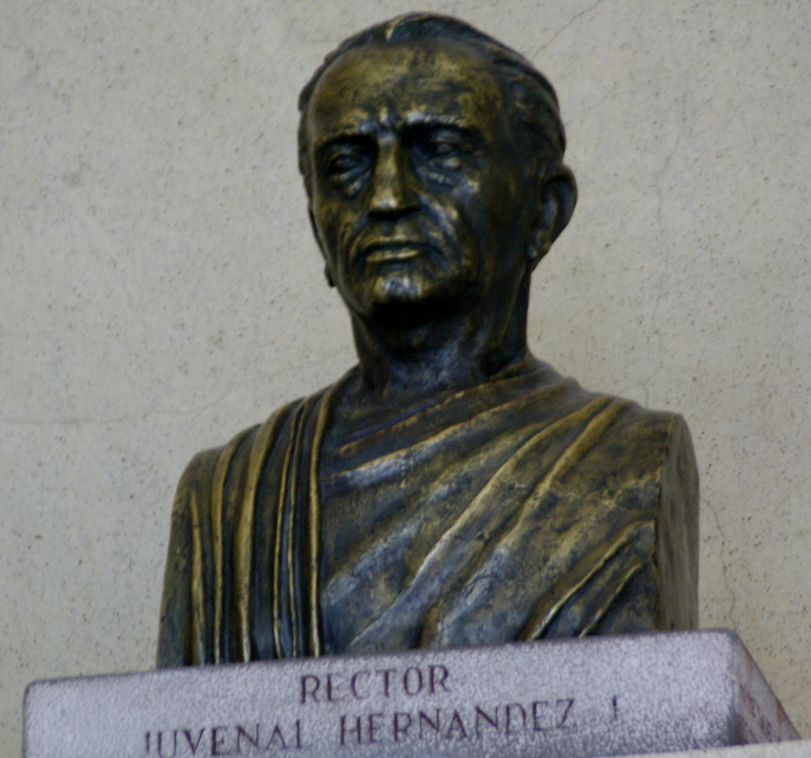 Busto del rector de la Universidad de Chile Juvenal Hernández Jaque, ubicado en la Escuela de Derecho, de la que fue también decano. El retrato es obra del escultor chileno Raúl Vargas (1908-1990).